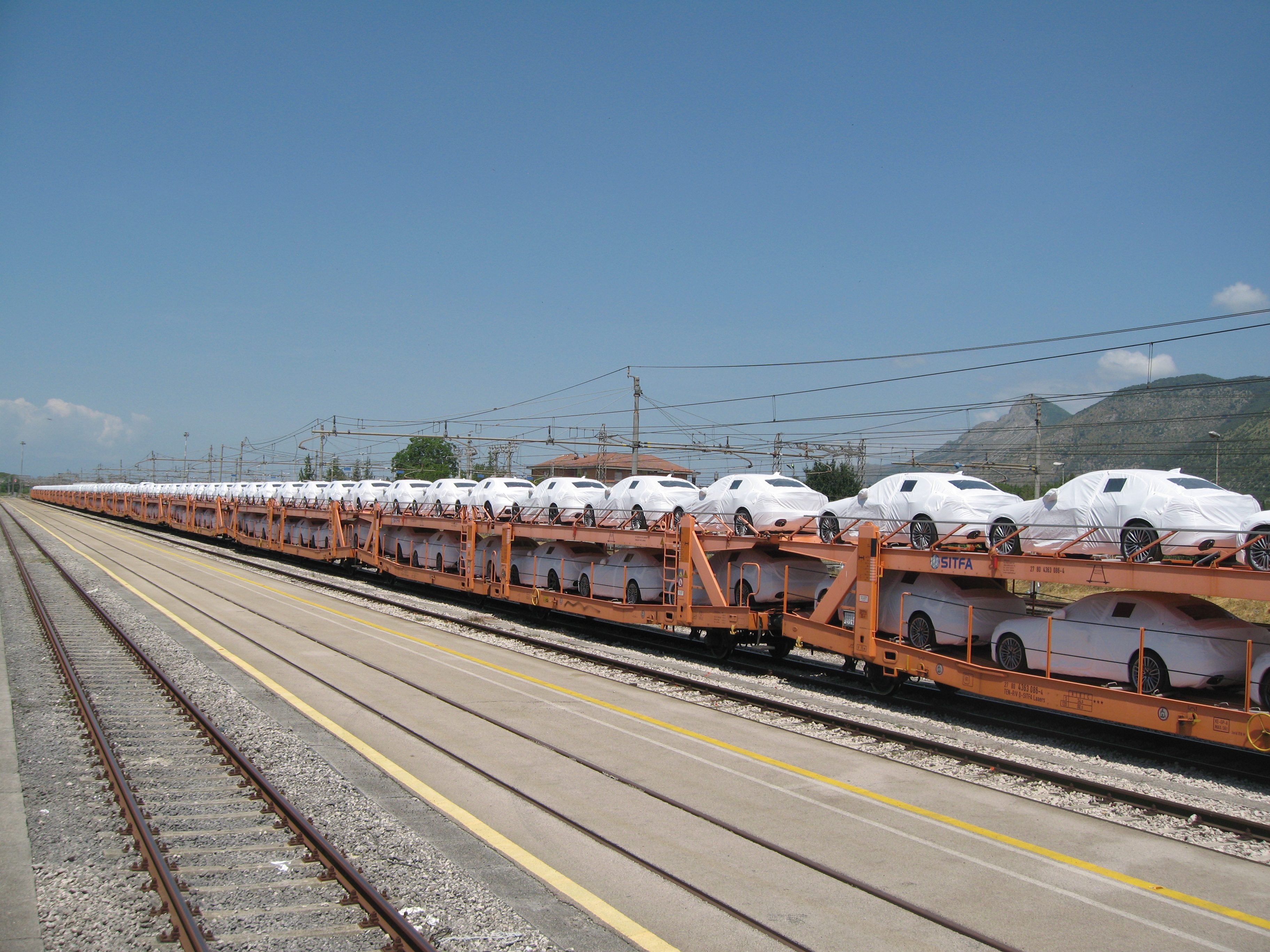 Treno composto da carri SITFA tipo 560 con vetture Alfa Romeo Giulia in partenza dallo stabilimento di Cassino